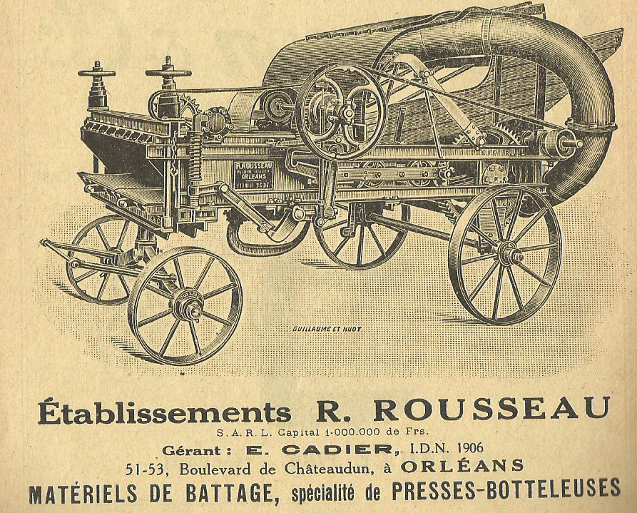 Publicité des établissements Rousseau (gérant Édouard Cadier, ingénieur IDN), machinisme agricole à Orléans, France - 1929